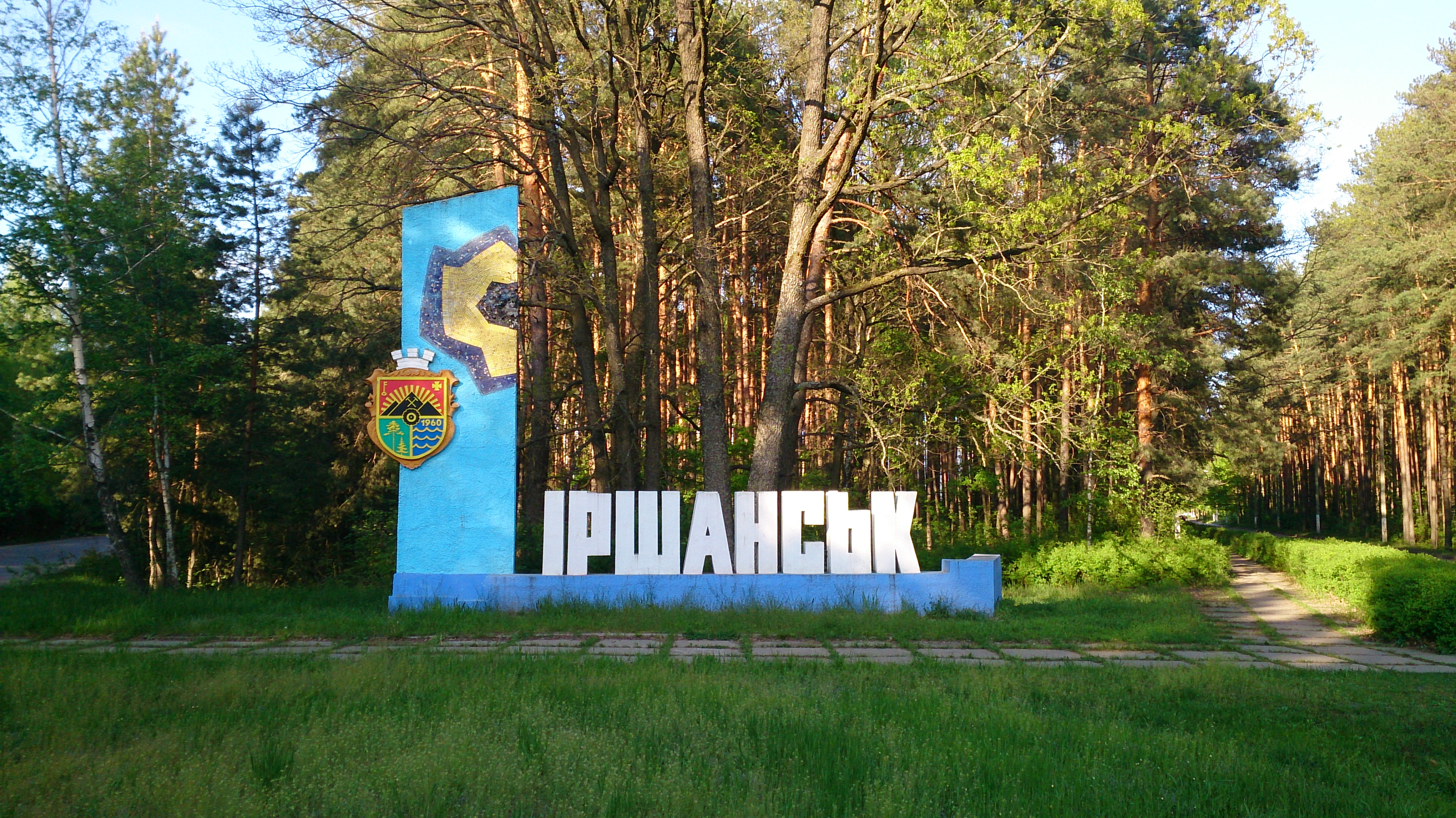 Знак на в'їзді в Іршанськ